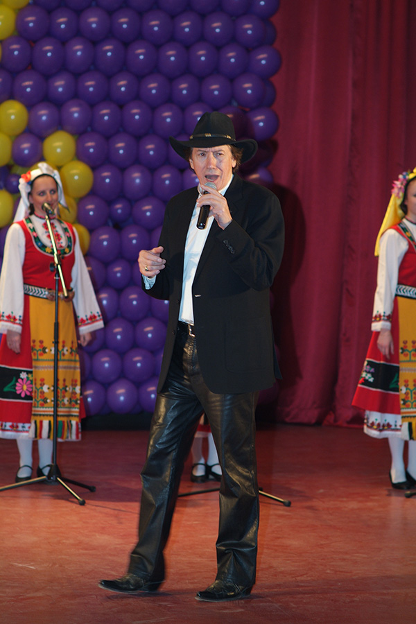 Выступление Бисера Кирова на Дне МИТХТ в актовом зале МИТХТ им. М.В. Ломоносова